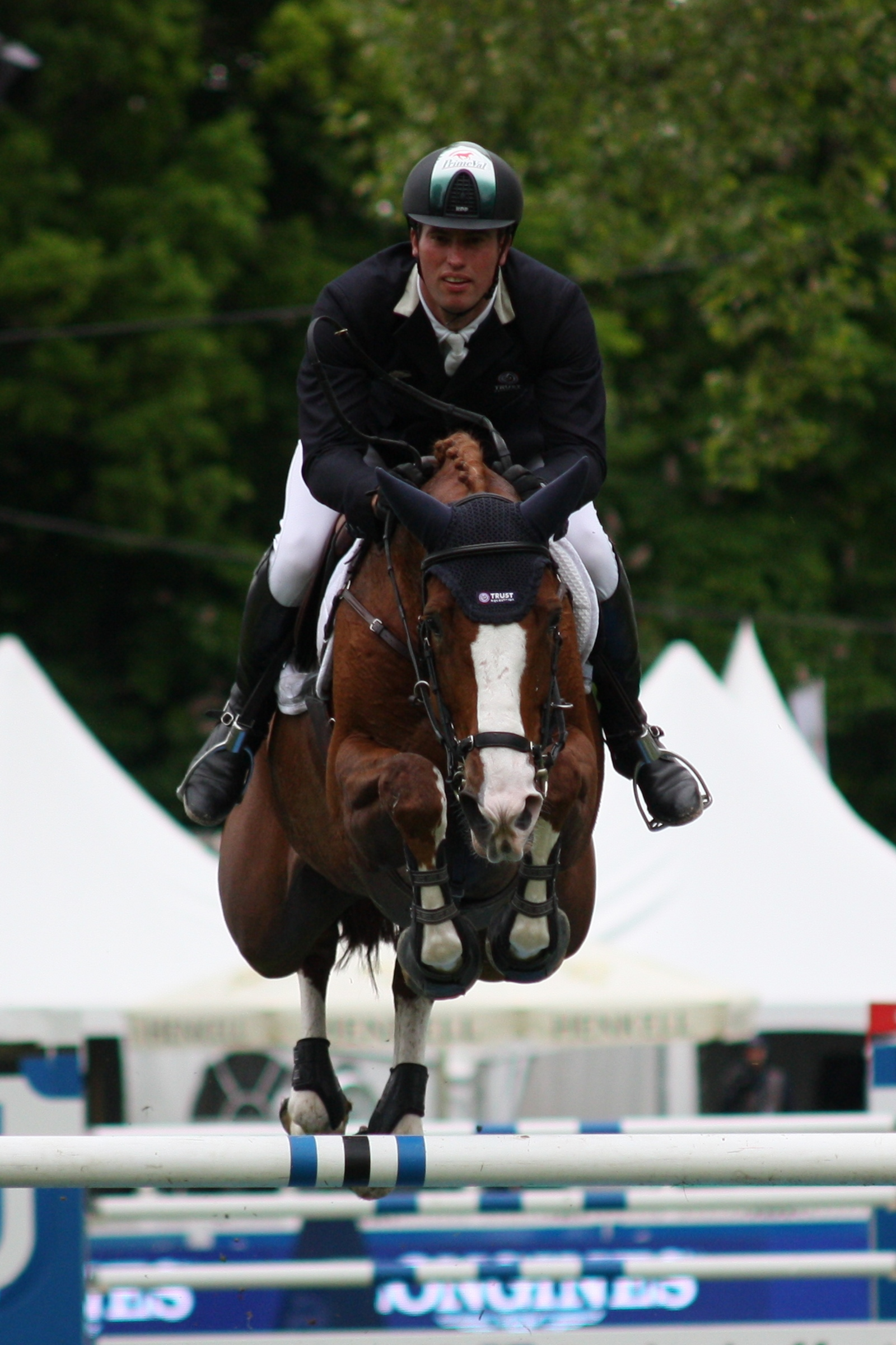 77. Internationanles Wiesbadener Pfingstunier 2013, CSI***** Eröffnungsspringen, Gert-Jan Bruggink auf Andrea Personality rights warning Although this work is freely licensed or in the public domain, the person(s) shown may have rights that legally restrict certain re-uses unless those depicted consent to such uses. In these cases, a model release or other evidence of consent could protect you from infringement claims.